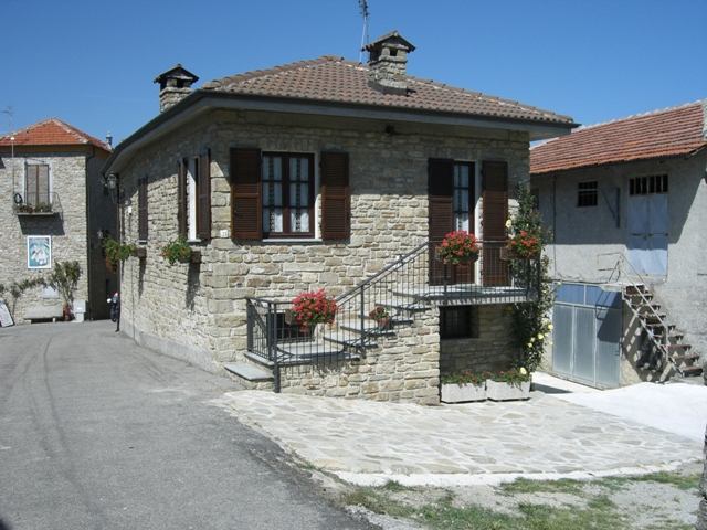 Bert. Fla. 75